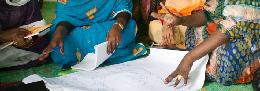 Photo